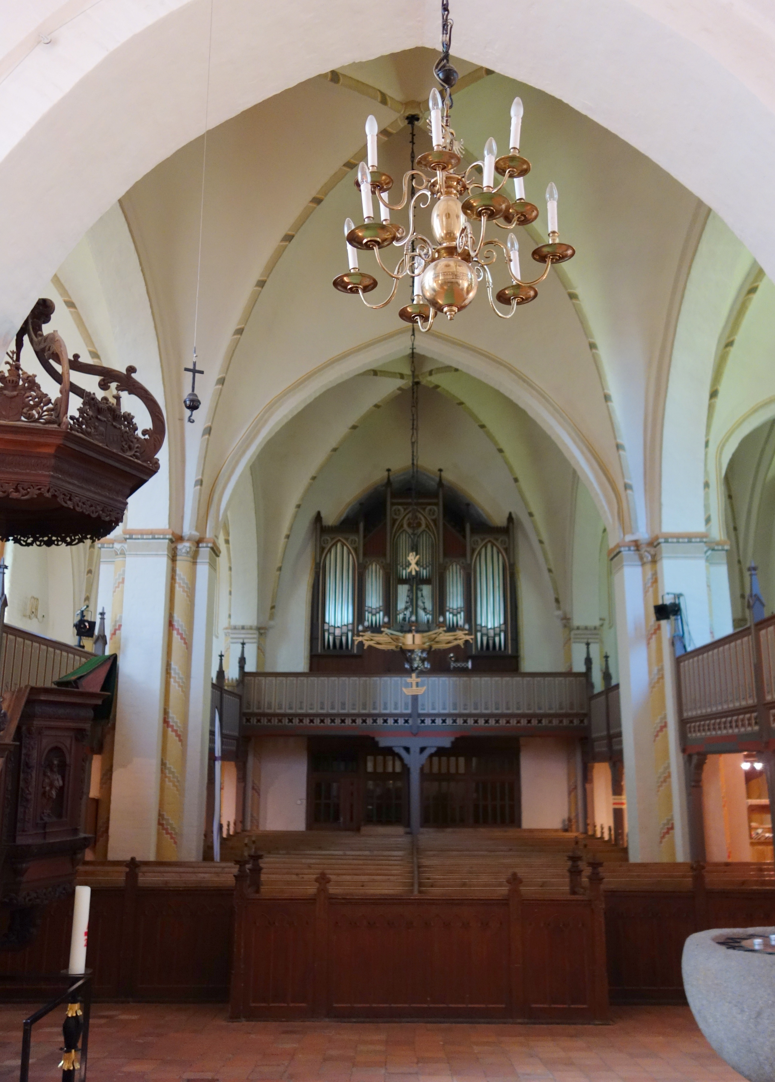 Stadtkirche Neubukow, Mecklenburg-Vorpommern, Deutschland